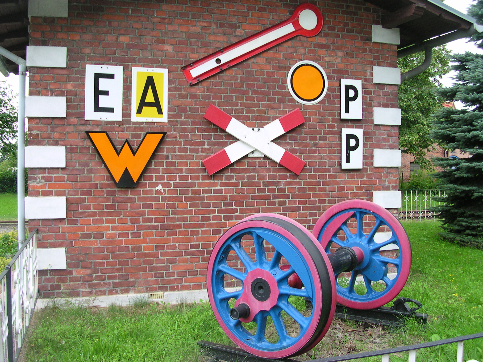 Außenwand des Museums im ehemaligen Schrankenwärterhäuschen in direkter Nachbarschaft des Bahnhofs Putlitz